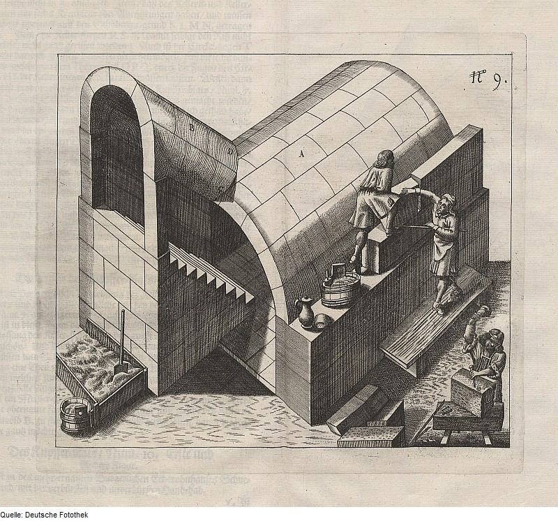 Original image description from the Deutsche Fotothek Architektur & Gebäude & Perspektive & Keller & Schalung & Gewölbe